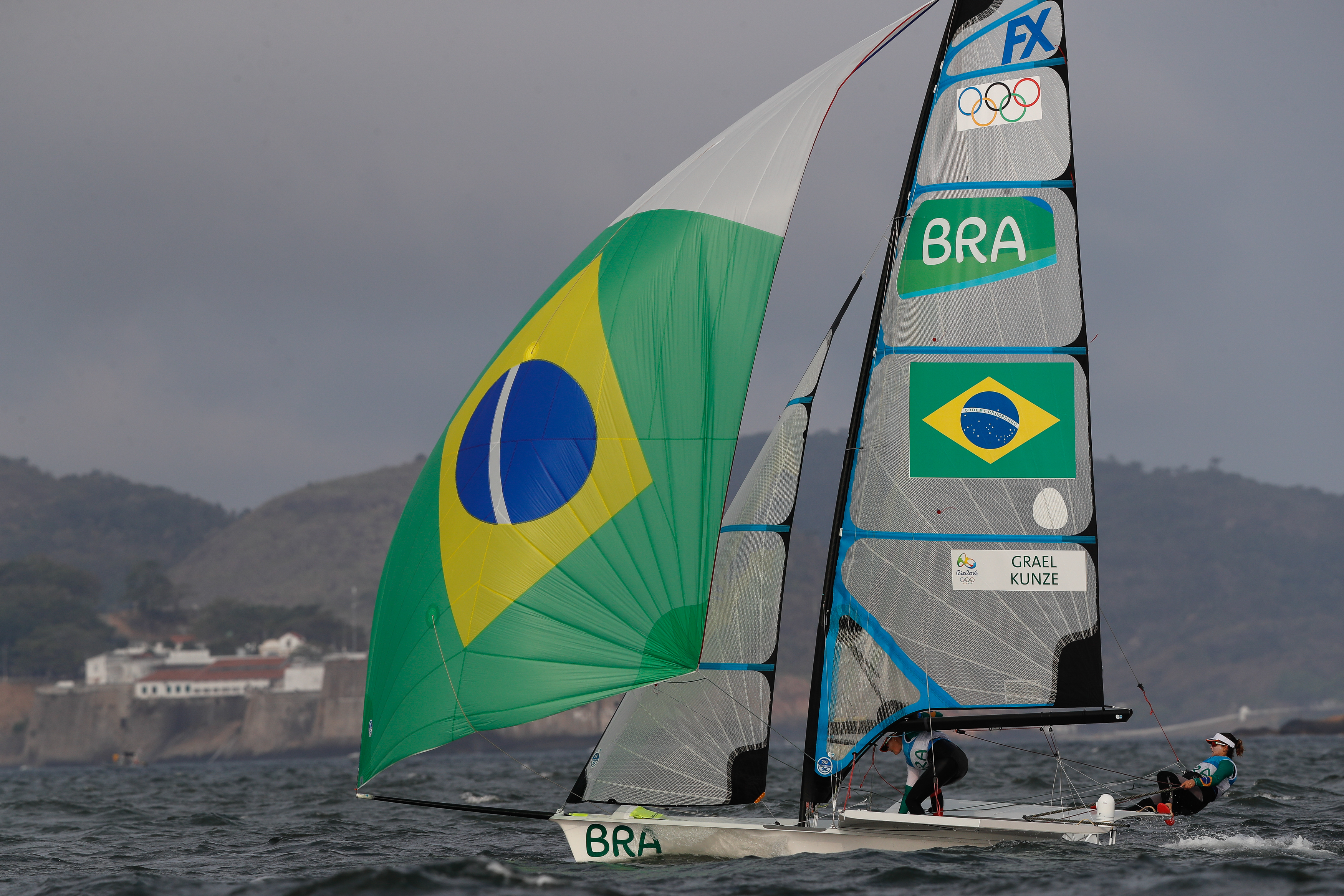 Rio de Janeiro - As brasileiras Martine Grael e Kahena Kunze conquistaram o ouro na classe 49er FX da vela dos Jogos Olímpicos Rio 2016, na regata final na Baía de Guanabara (Fernando Frazão/Agência Brasil)